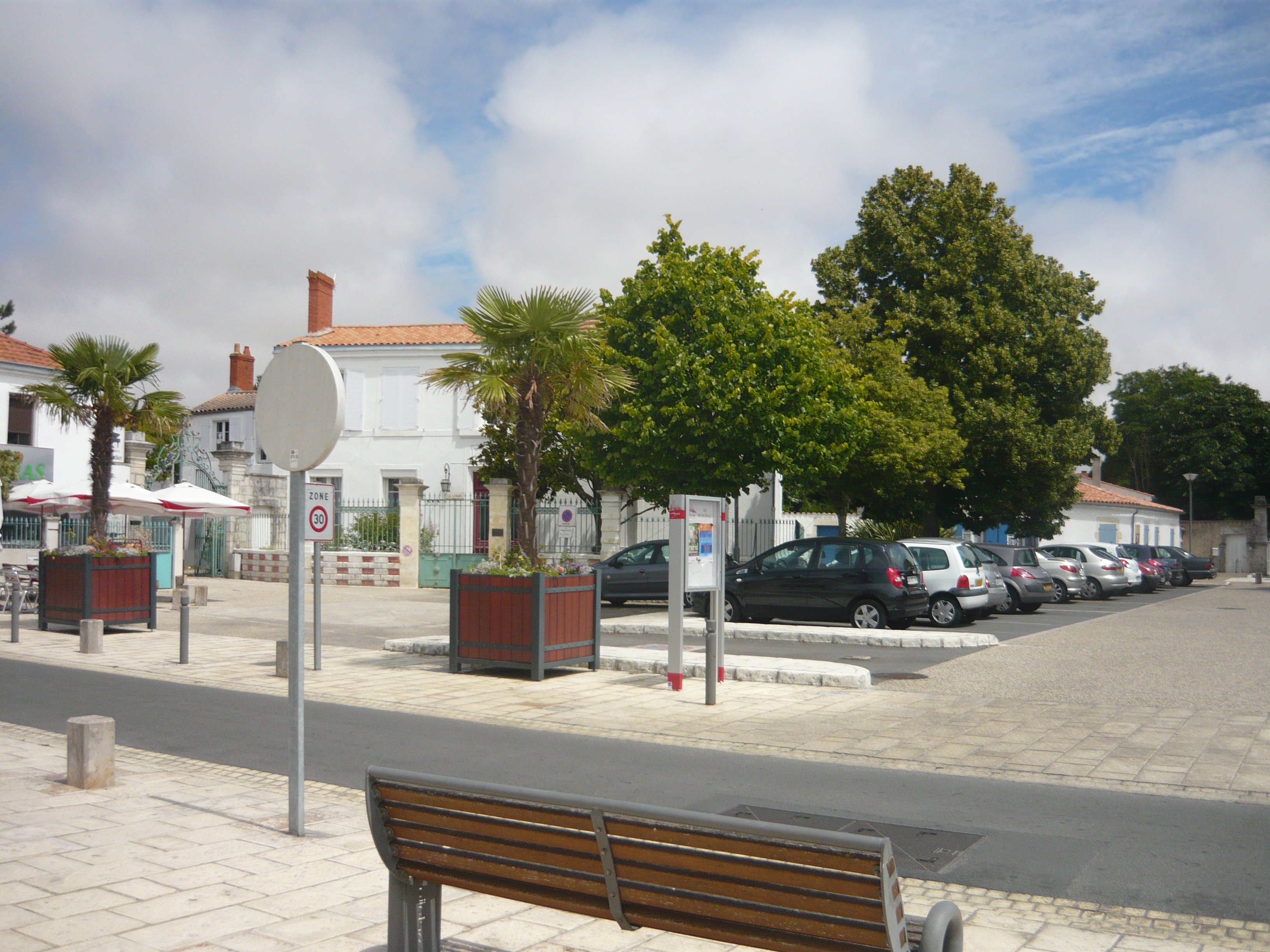 La place de la République à Aytré est à l'angle de la rue Edmond Grasset et de la rue de la Gare. Au fond, le petit square de la Résistance.